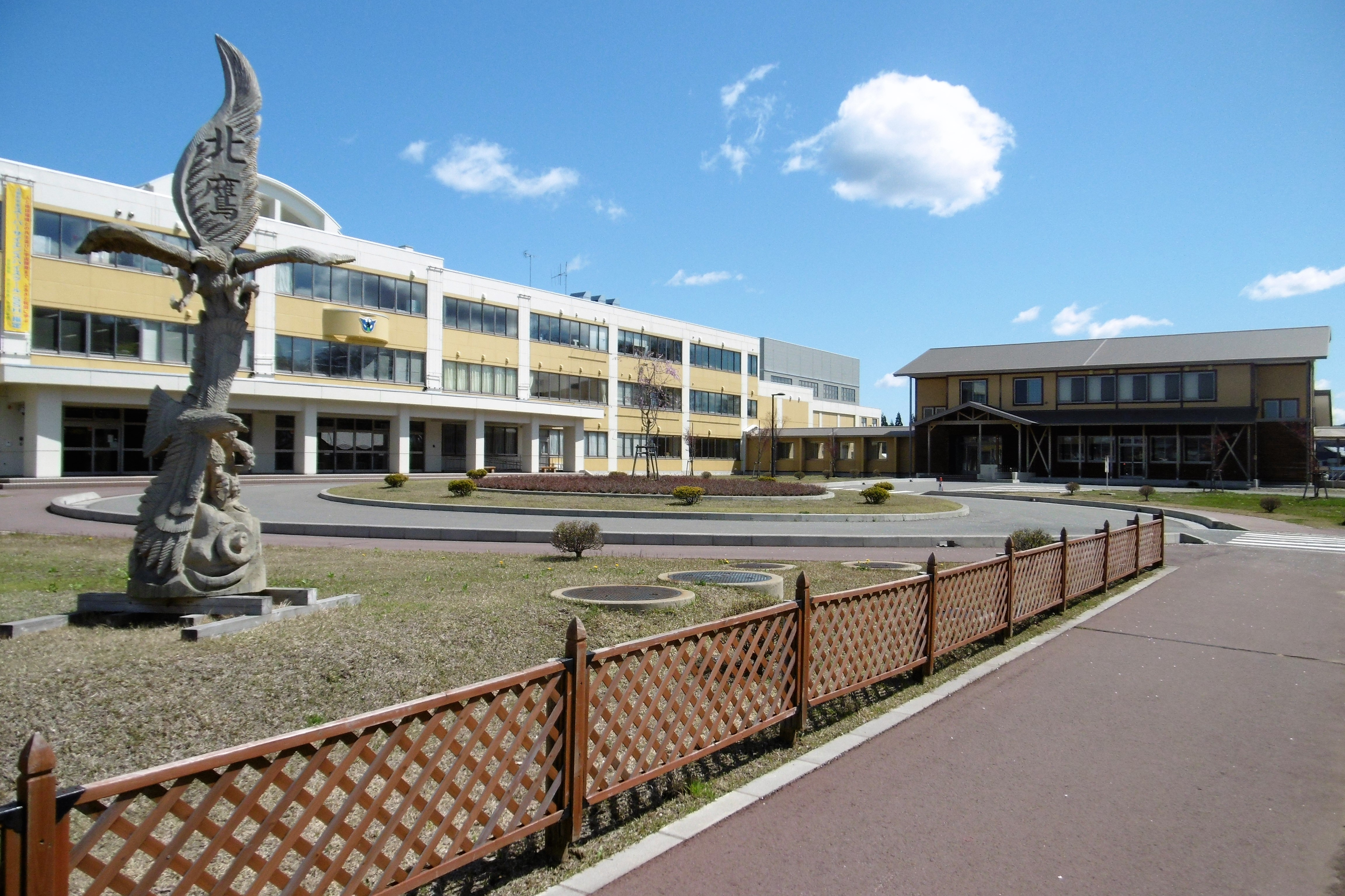 秋田県立秋田北鷹高等学校（秋田県北秋田市）